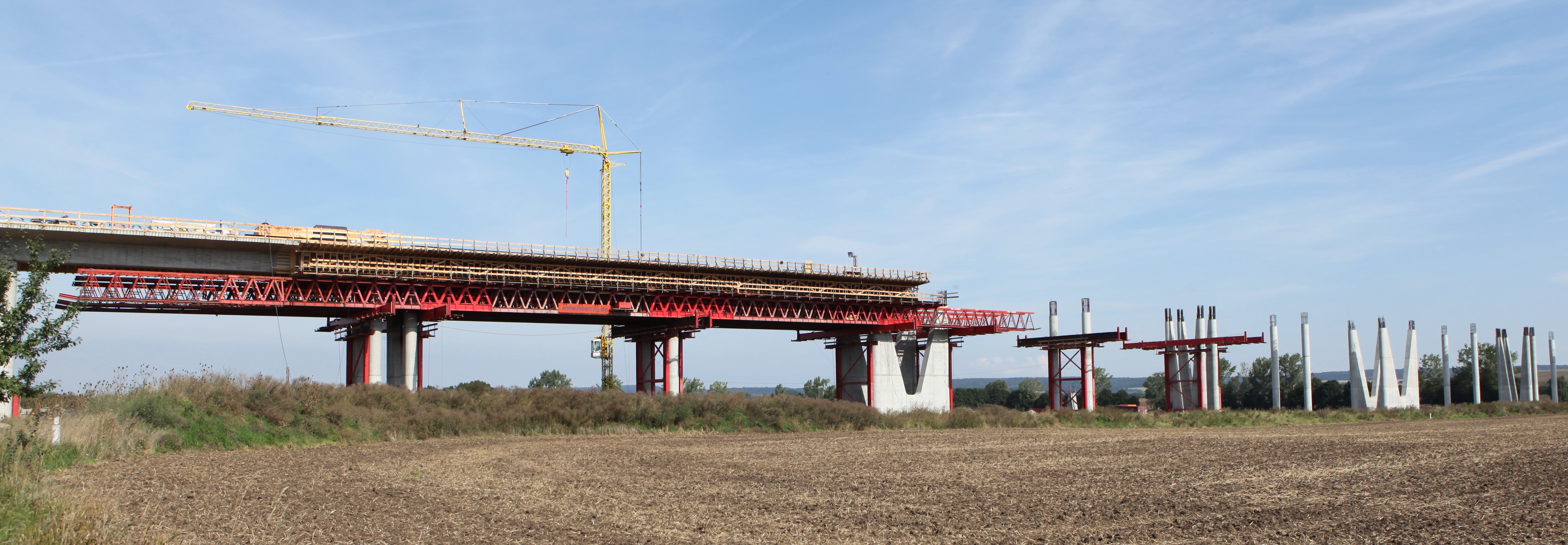 Gänsebachtalbrücke bei Buttstädt in Thüringen